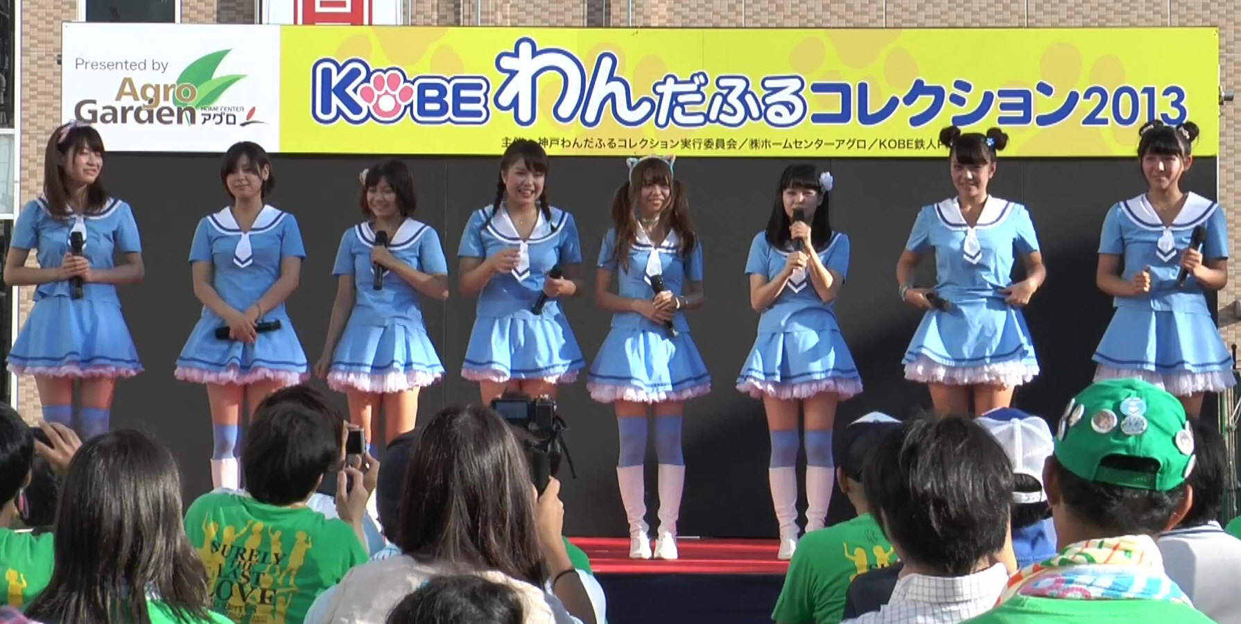 KOBerrieS♪LIVE ⑤ 「夏色太陽」 at KOBEわんだふるコレクション2013